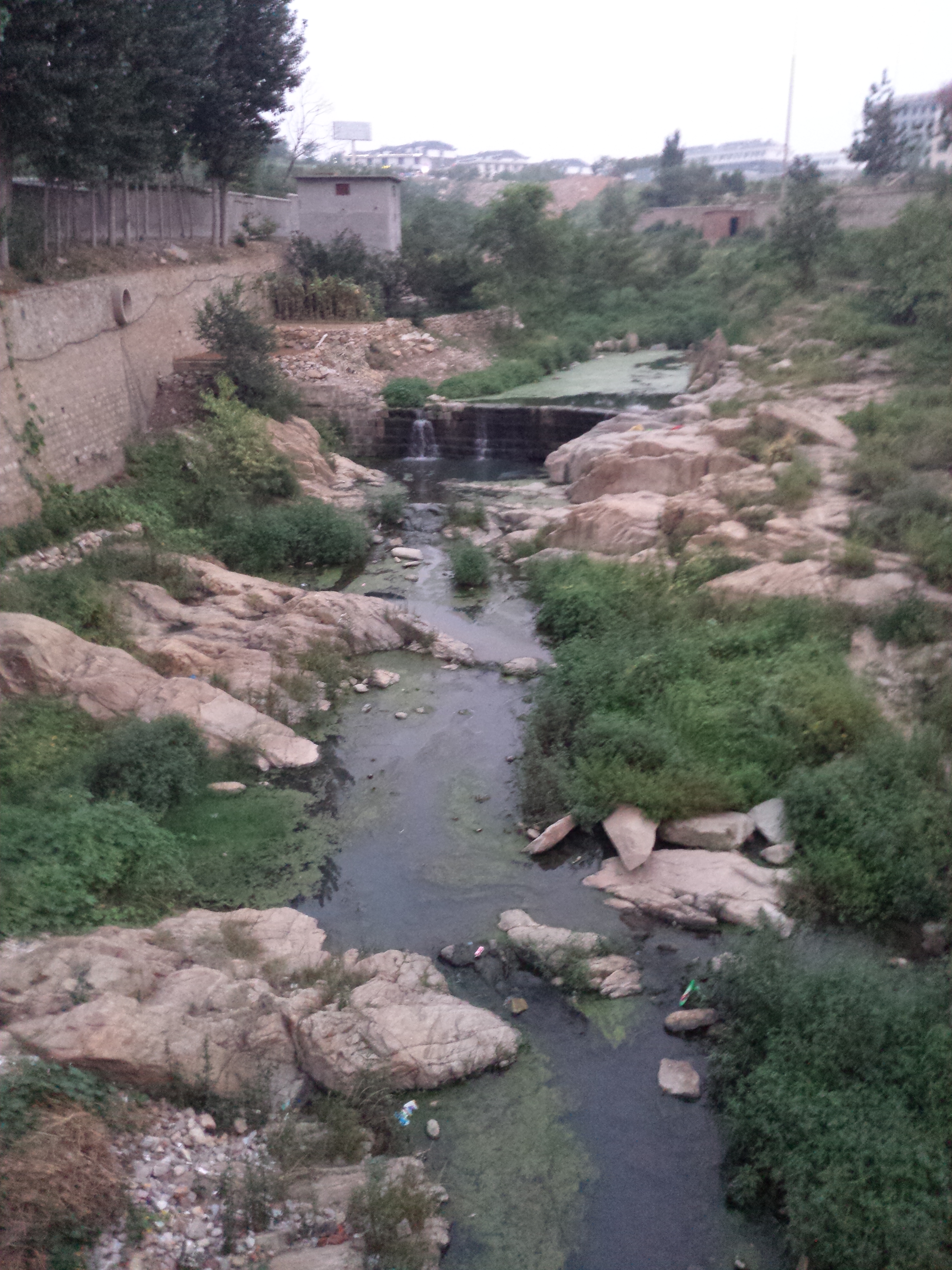 岱西河，小常庄段